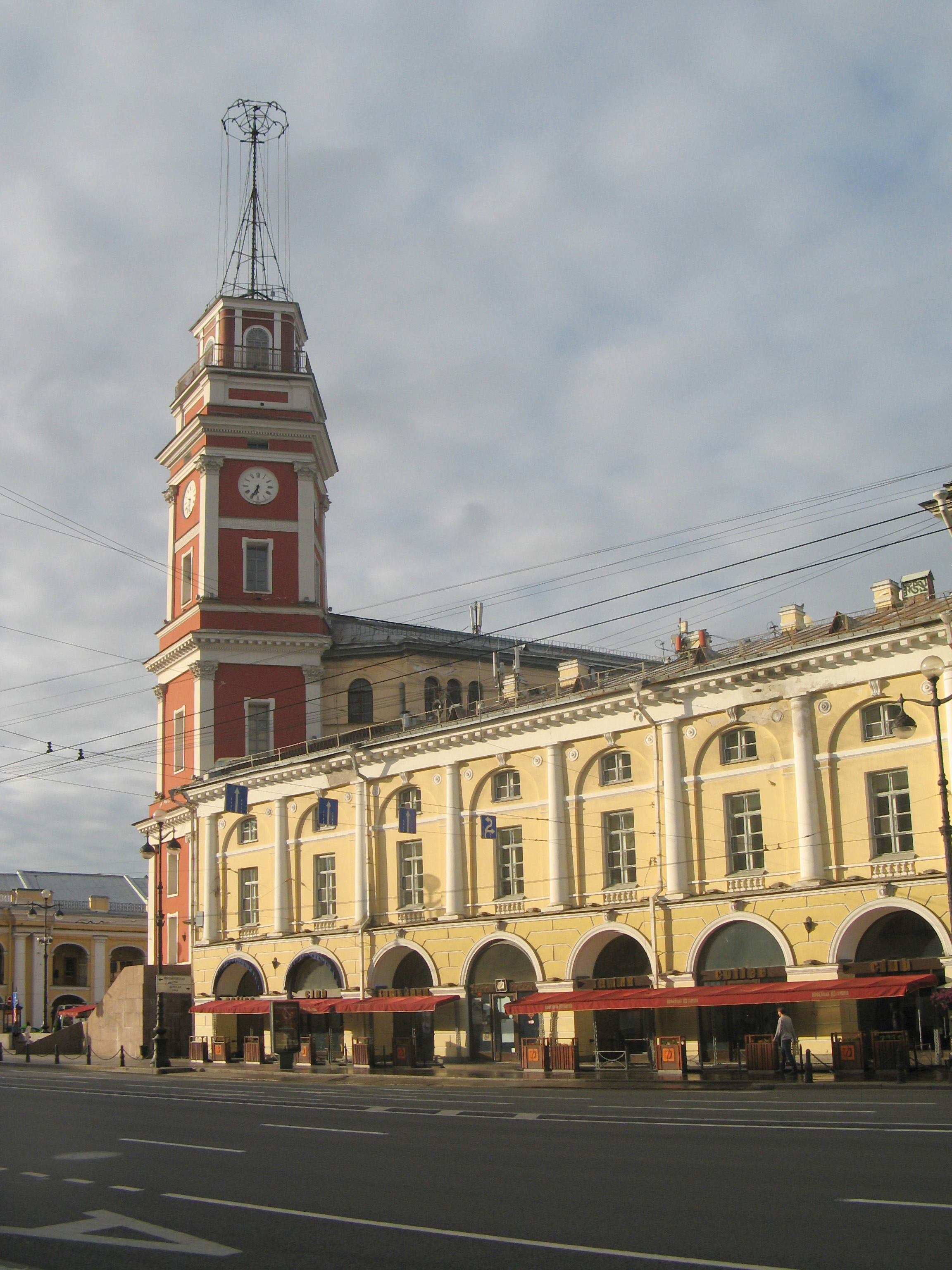 Дума городская с башней: улица Думская, 1-3, Невский проспект, Центральный район, Санкт-Петербург